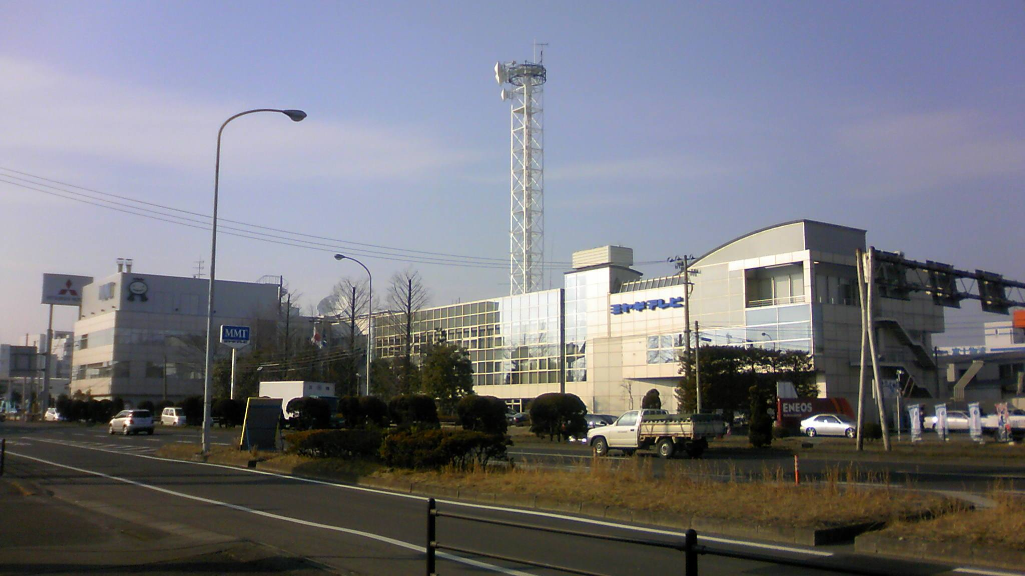 宮城テレビ放送社屋